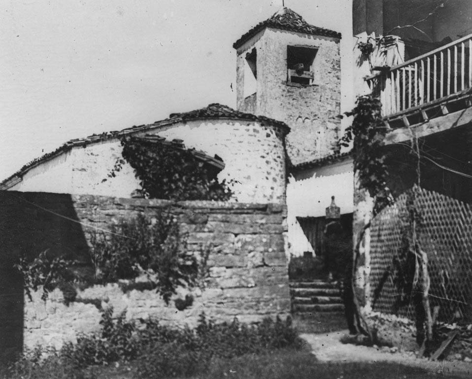 Casa i església al fons a Falgars d'en Bas. Cèsar August Torras i Ferreri (Entre 1890 i 1923)